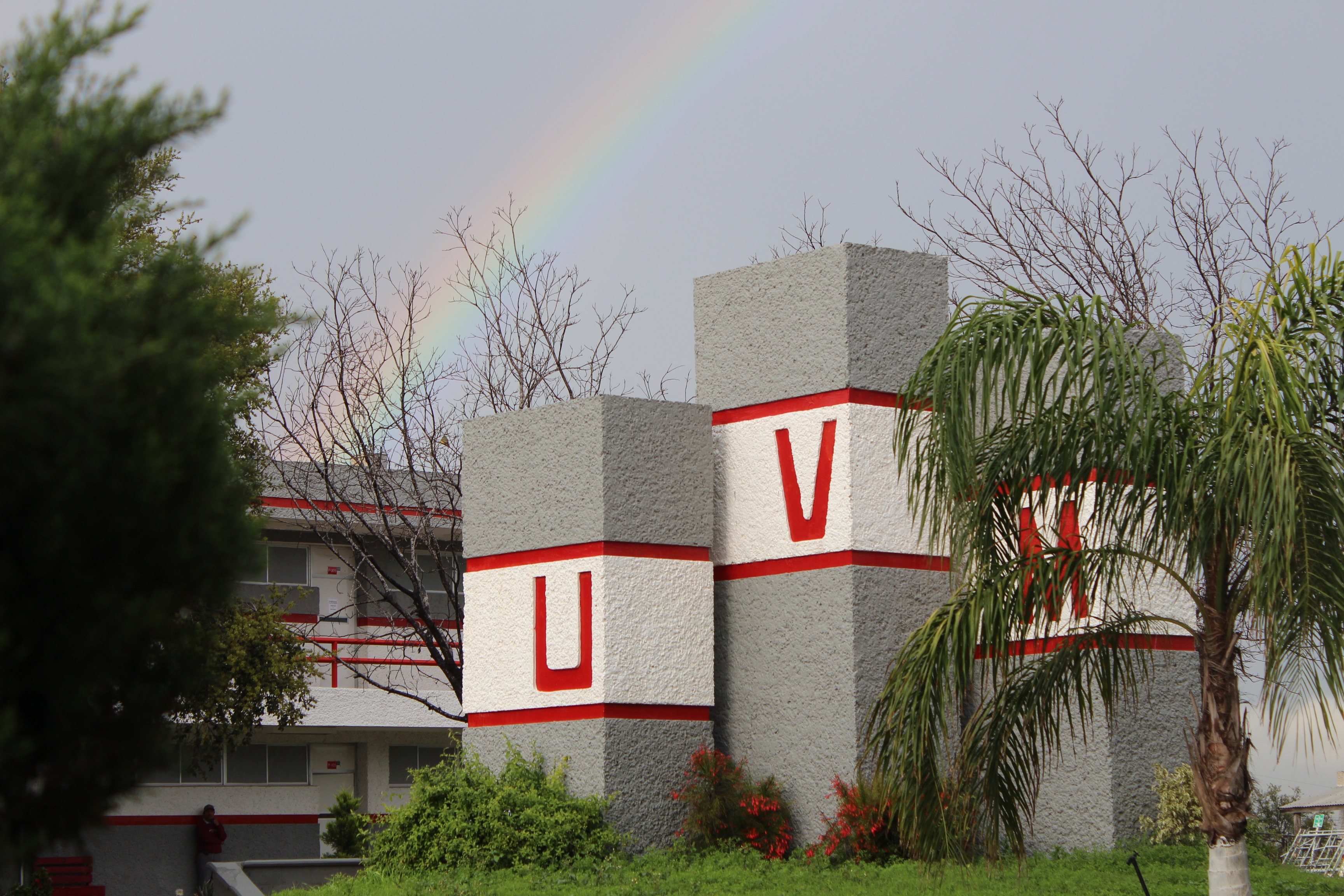 imagen de un espectro visible (arcoiris) en uvm campus reynosa